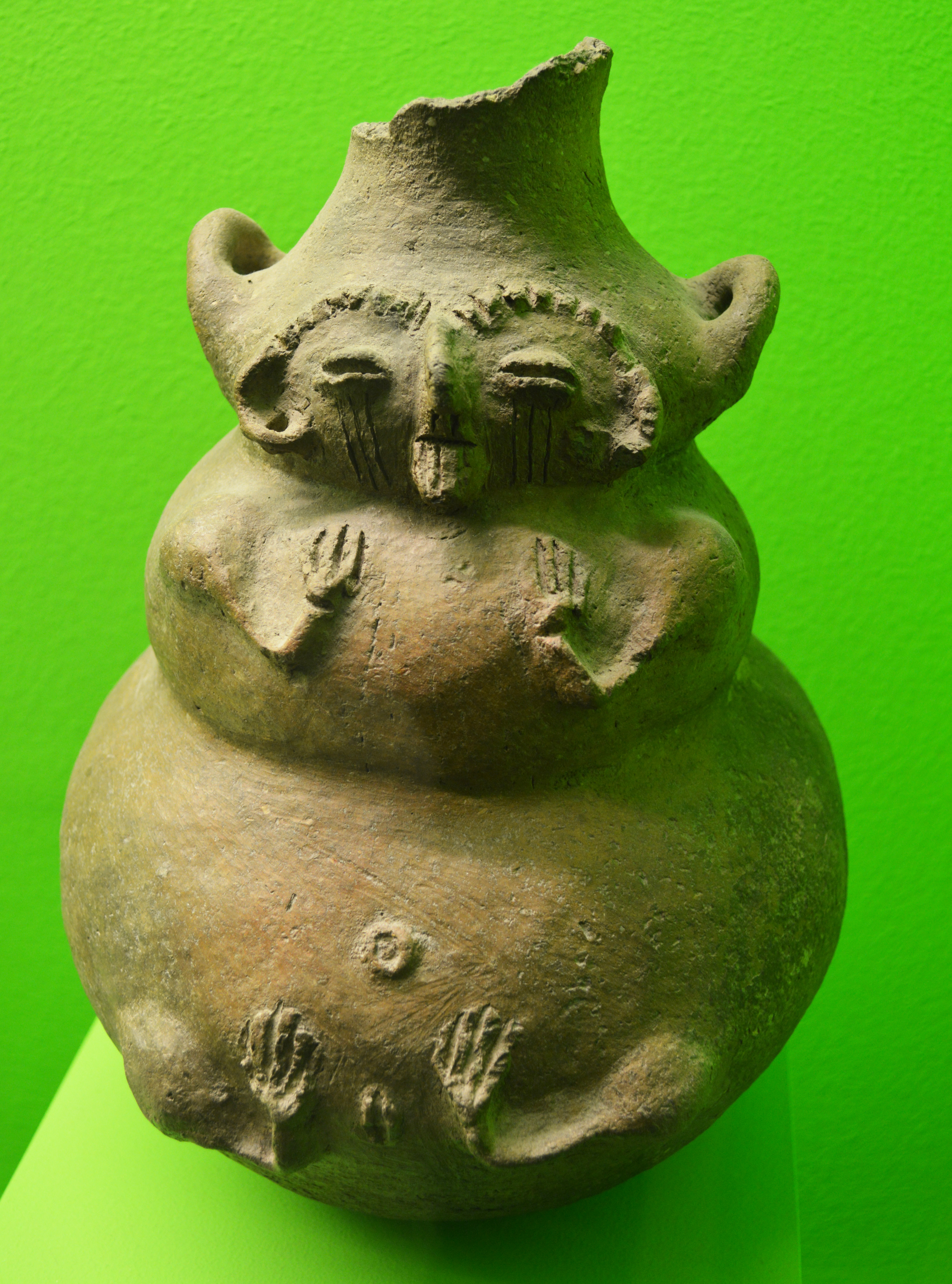 Alfarería indígena.